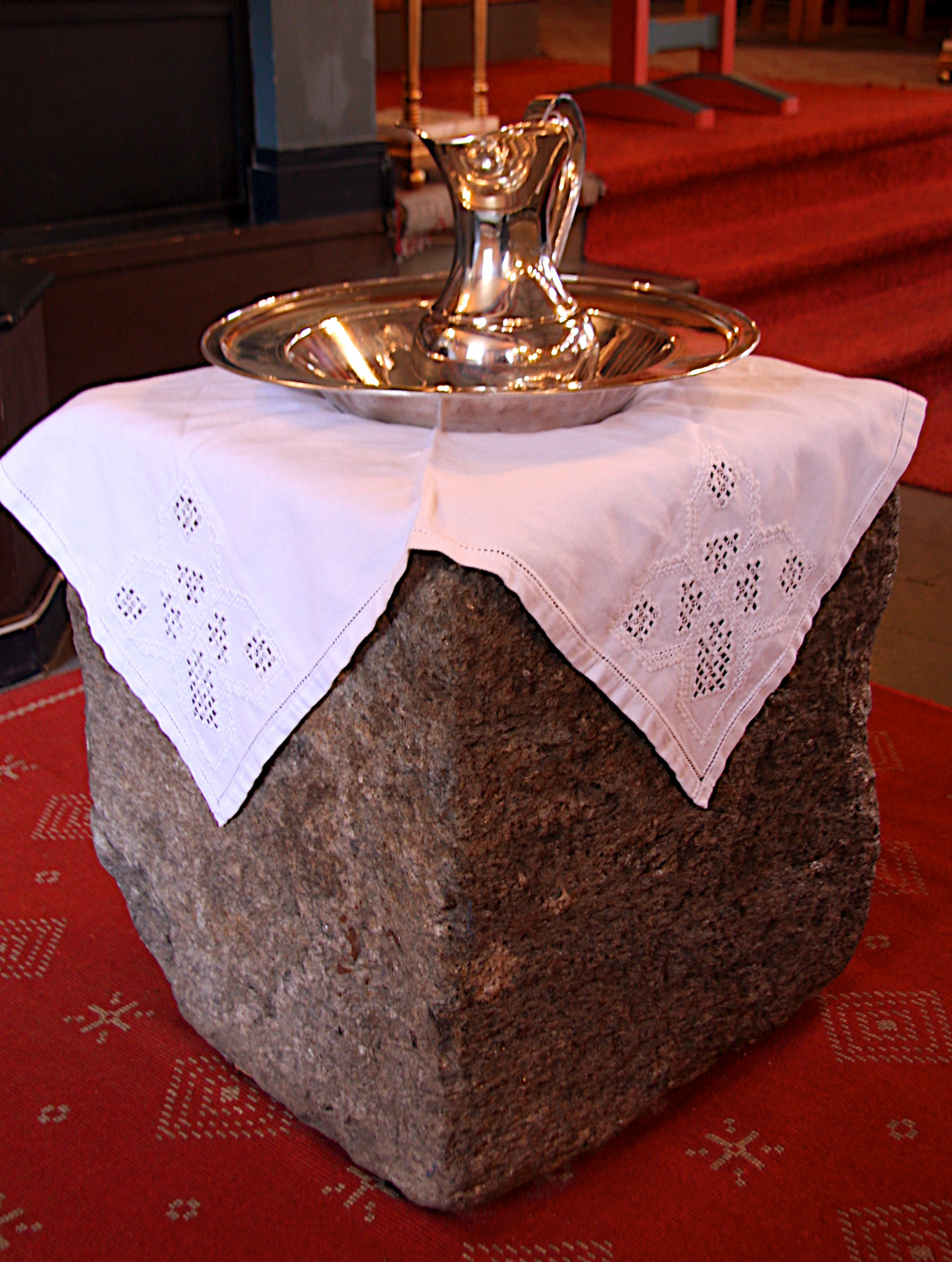 Døpefonten i Gulen kirke